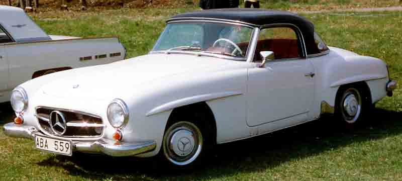 Mercedes-Benz 190 SL Coupé 1962